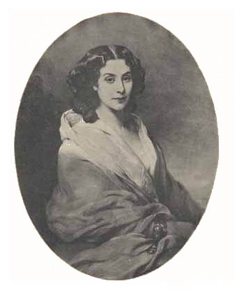 Софья Андреевна Гагарина, ур. Дашкова (1822-1905), фрейлина, статс-дама.